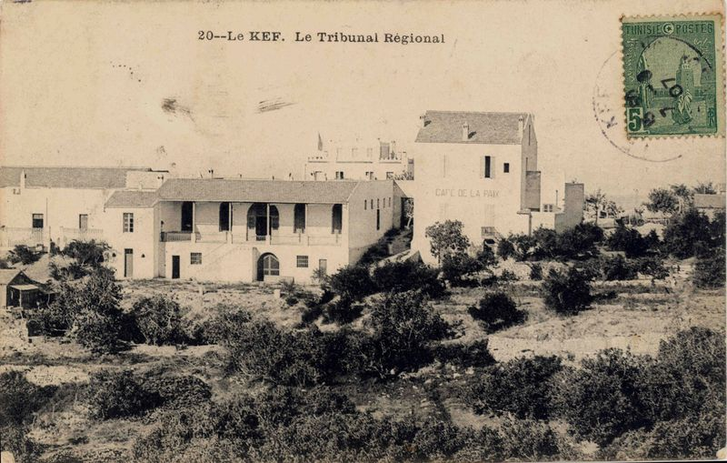 Tribunal du Kef à l'époque du protectorat